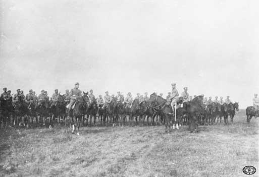 Przegląd oddziałów legionowych dokonywany przez niemieckiego gen. Friedricha von Bernhardiego. Na zdjęciu widoczny szwadron rtm. Mariusza Zaruskiego (z prawej przed frontem) z 1 Pułku Ułanów Legionów Polskich. Czeremoszno na Wołyniu.